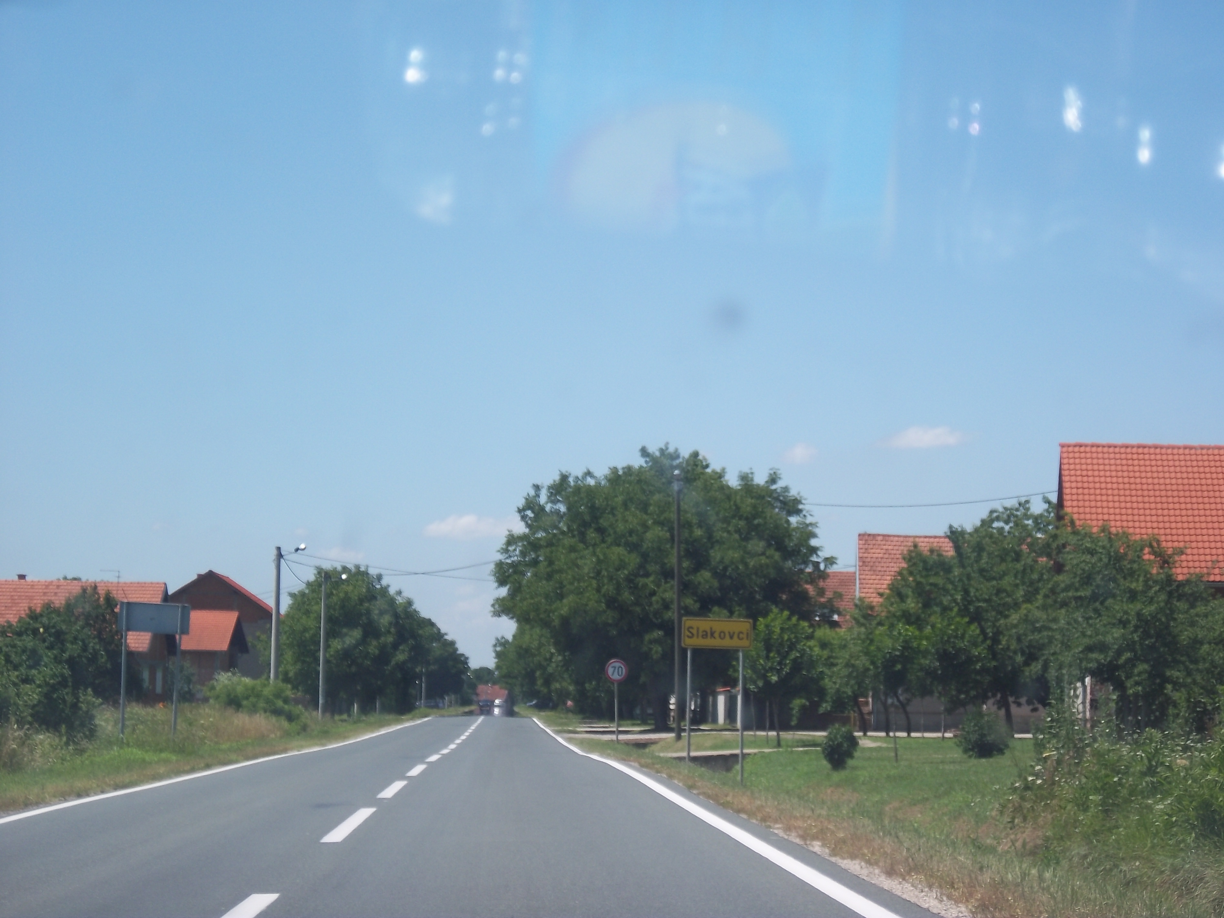 Srpskohrvatski / српскохрватски: Ulaz u Slakovce, Republika Hrvatska